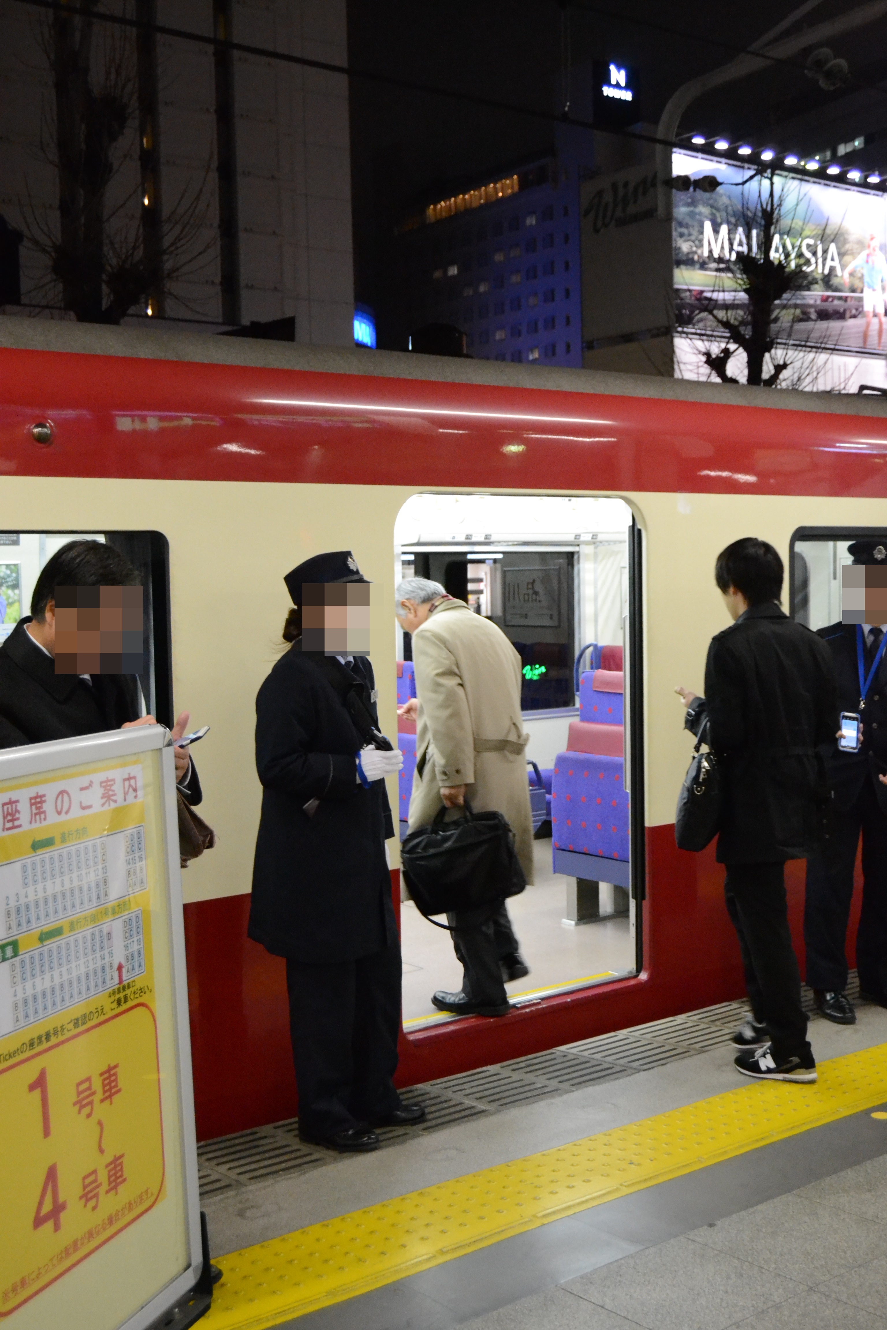 京浜急行品川駅3番線ホームで出発を待つ京急｢ウイング｣号の2100形電車の4号車に乗り込む乗客